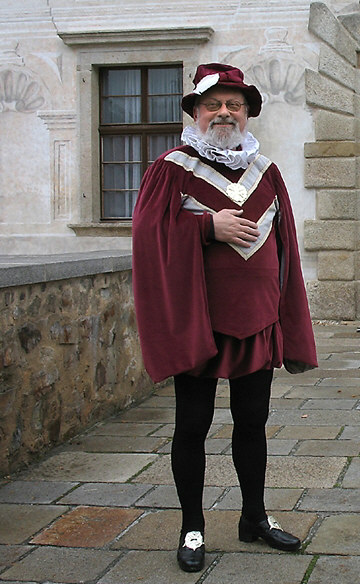 ĉeĥa esperantisto Jan Řepa rolanta kiel renesanca nobelo Petr Vok, bonveniganta esperantlingve partoprenantojn de REF 2006 en la ĉaskastelo Kratochvíle en Sudbohemia regiono